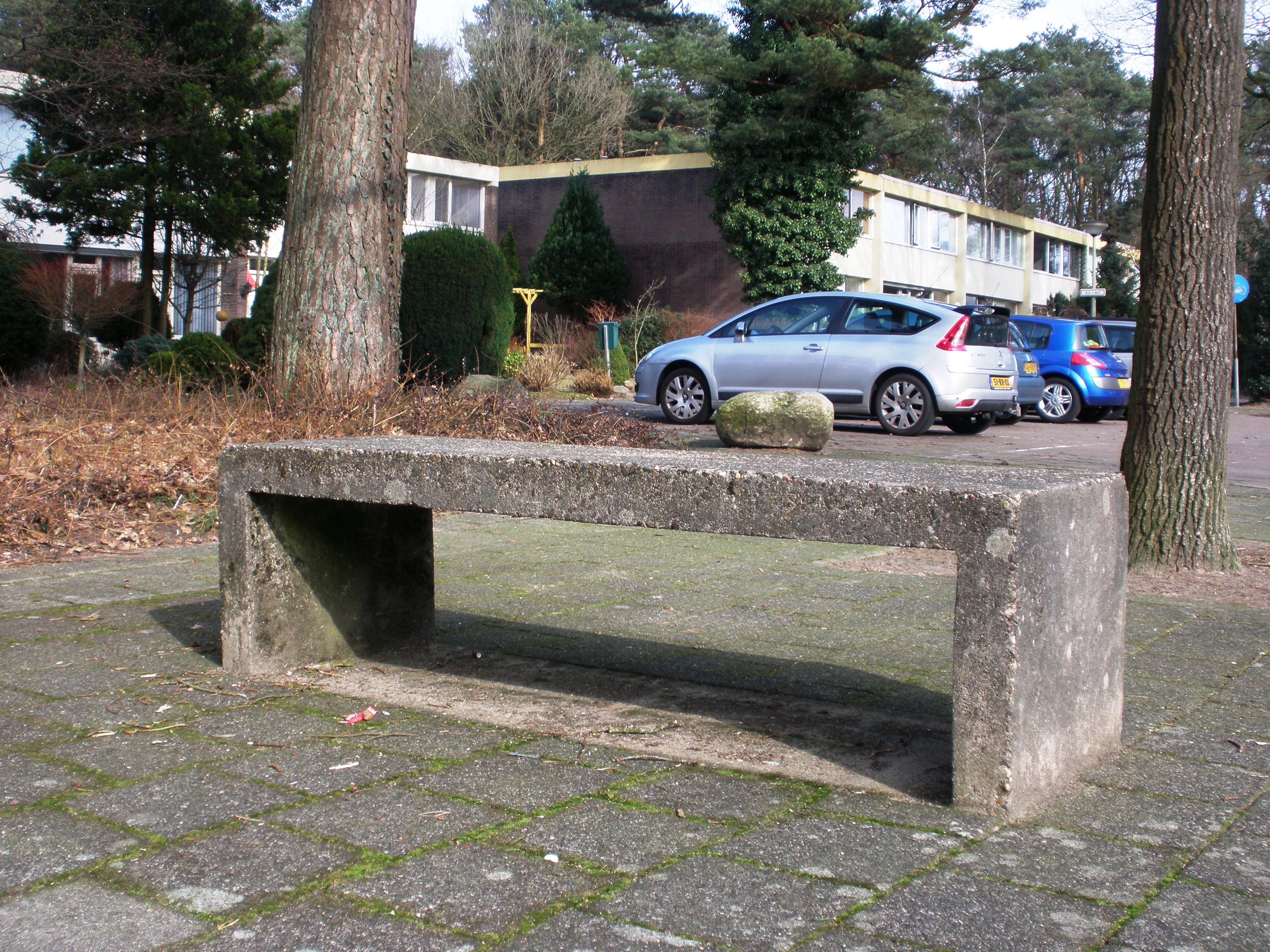 Een betonnen bankje in de wijk Emmerhout van Emmen. De rechthoekige vorm keert voortdurend terug in de architectuur van de wijk.